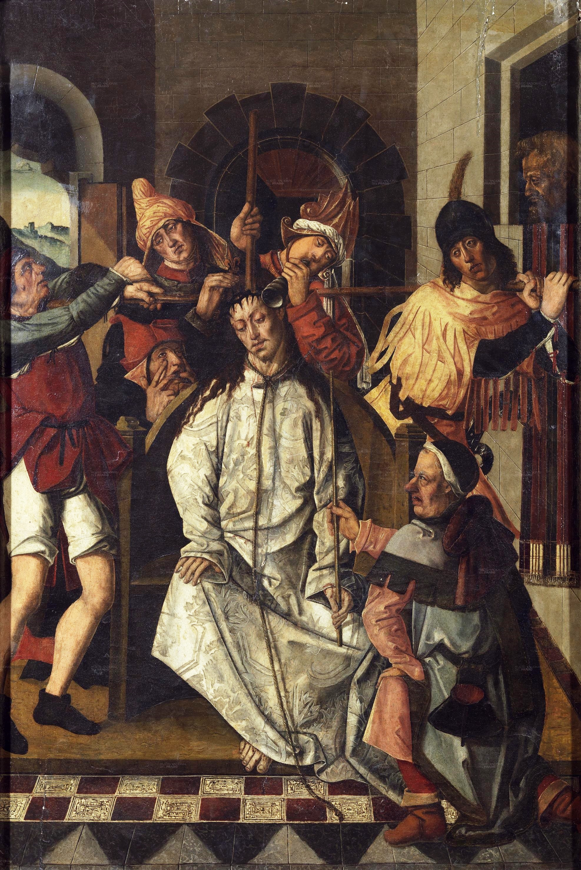 La obra representa el momento en que Jesucristo fue coronado de espinas.